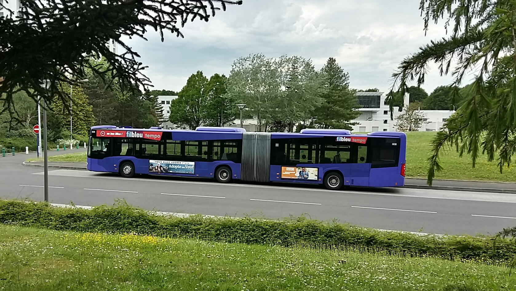 Mercedes-Benz Citaro G C2 Tempo n°608 au terminus "CHU Trousseau" en direction de Les Douets.